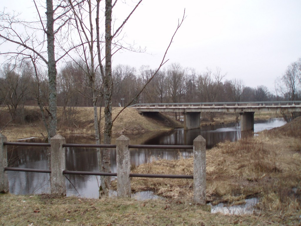 Tilts pār Lielo Juglu Sidgundā, skats no vecā tilta. 2008. gada 9. februārī. Foto - Modris Frikmanis.